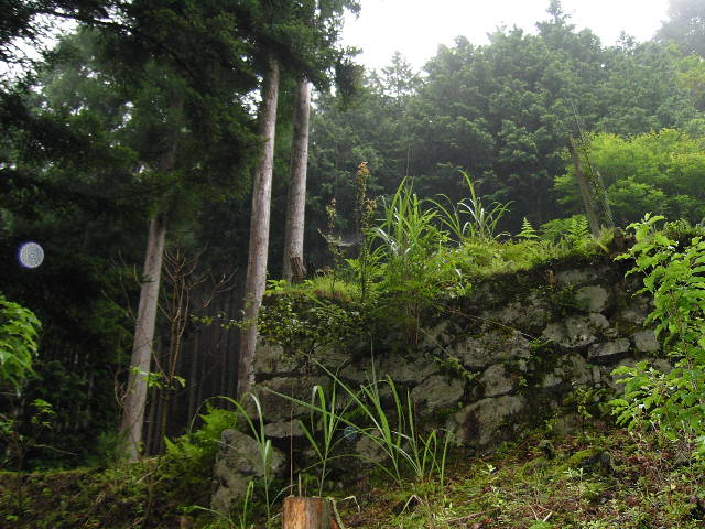 京都丹波高原（京都市左京区）での北山杉営林 急斜面のため土砂崩れ防止と獣が里に下りてこないようにするための石垣を積む